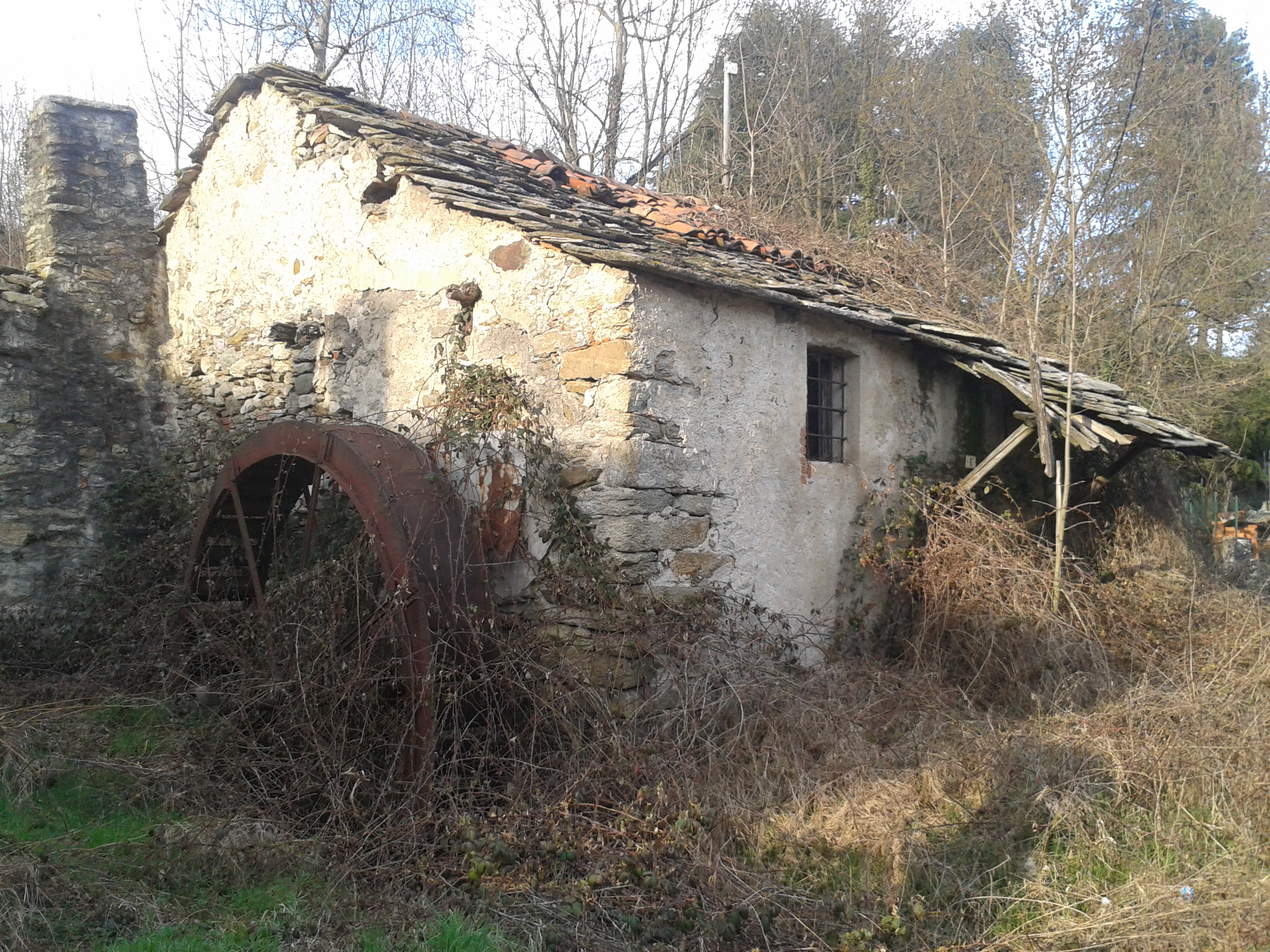 Antico mulino ad acqua ormai abbandonato, sito in via del Mulino in frazione Priacco, a Cuorgnè (To).